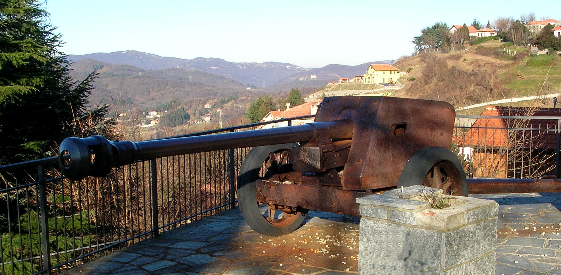 Pezzo di artiglieria della seconda guerra mondiale (Santuario della Vittoria, Mignanego, Genova). Si tratta di un cannone anticarro tedesco costruito dalla Rheinmetall calibro 75mm tipo PAK40. (by GianPapar). Foto propria Dicembre 2008